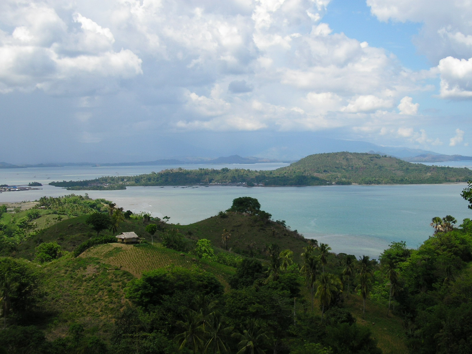 Kwandang Area, Gorontalo (Indonesia)